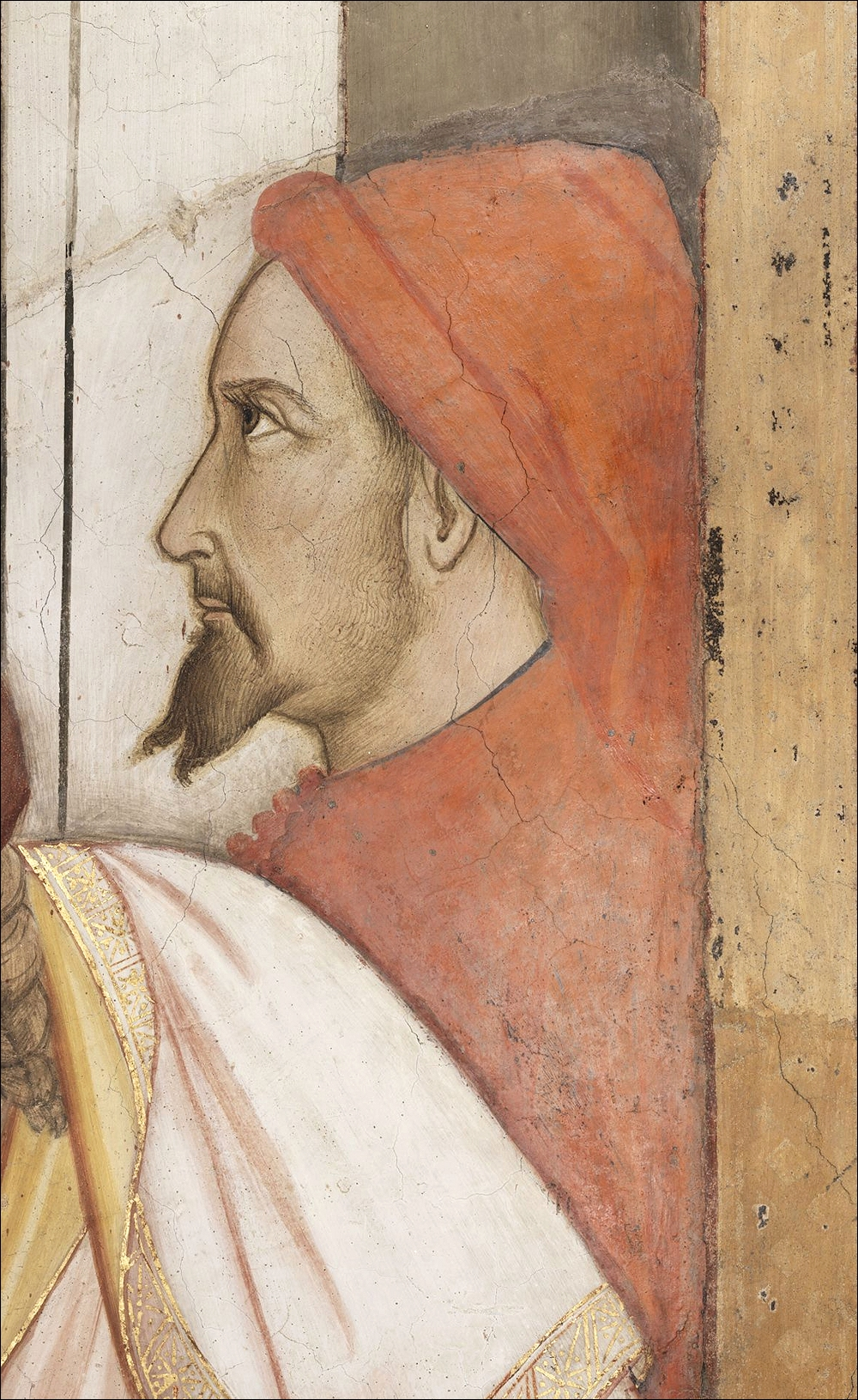 Santa Croce, Cappella Maggiore, Firenze